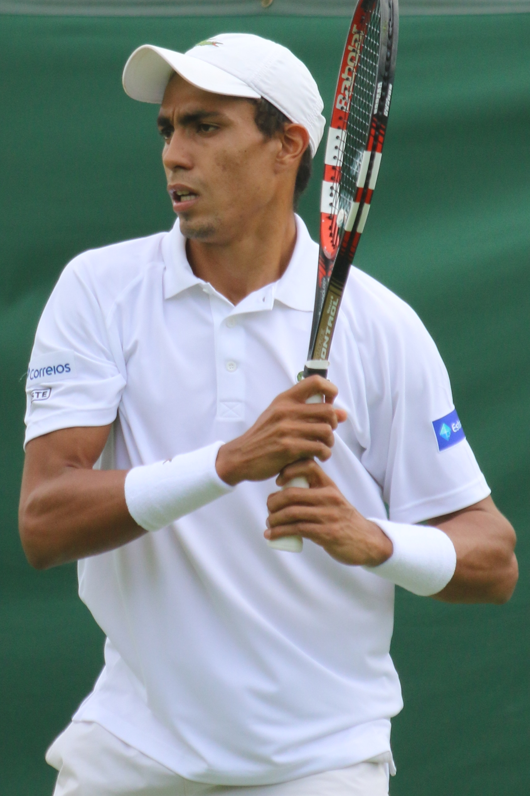 Monteiro WMQ16 (5)